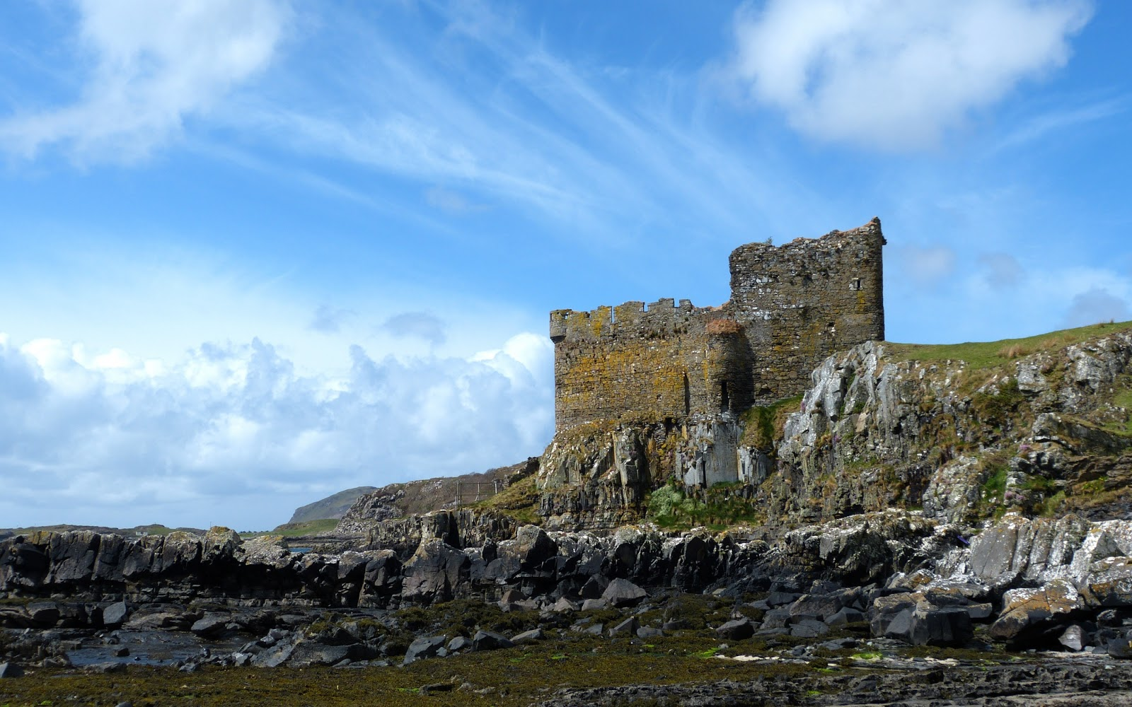 Mingary Castle, Ansicht von Osten